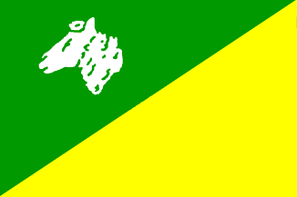 Oanbean troch Rudolf J. Broersma, tekener Fryske Rie foar Heraldyk